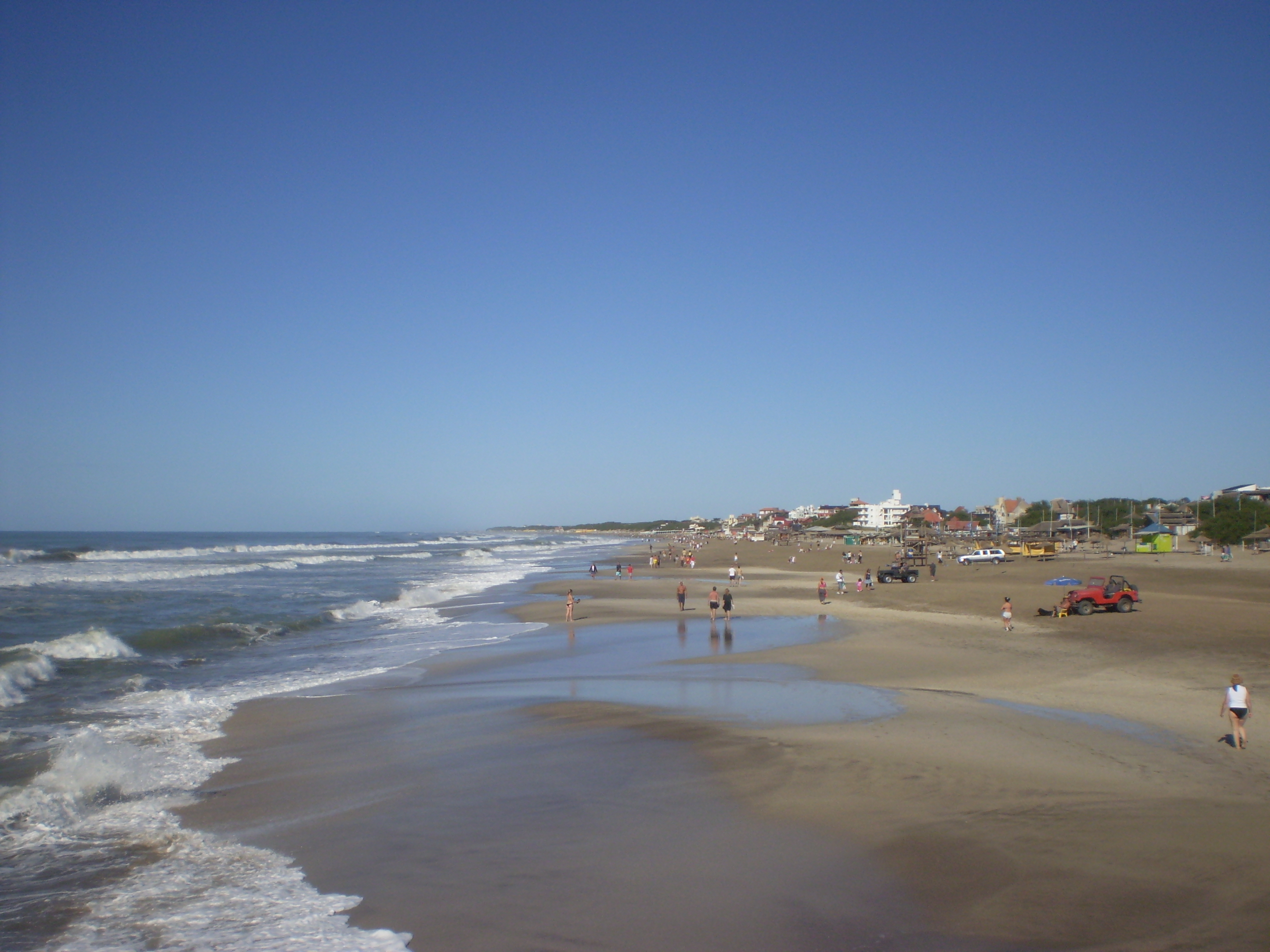 Pinamar, Argentina. Vista desde el muelle de pescadores hacia el sur.